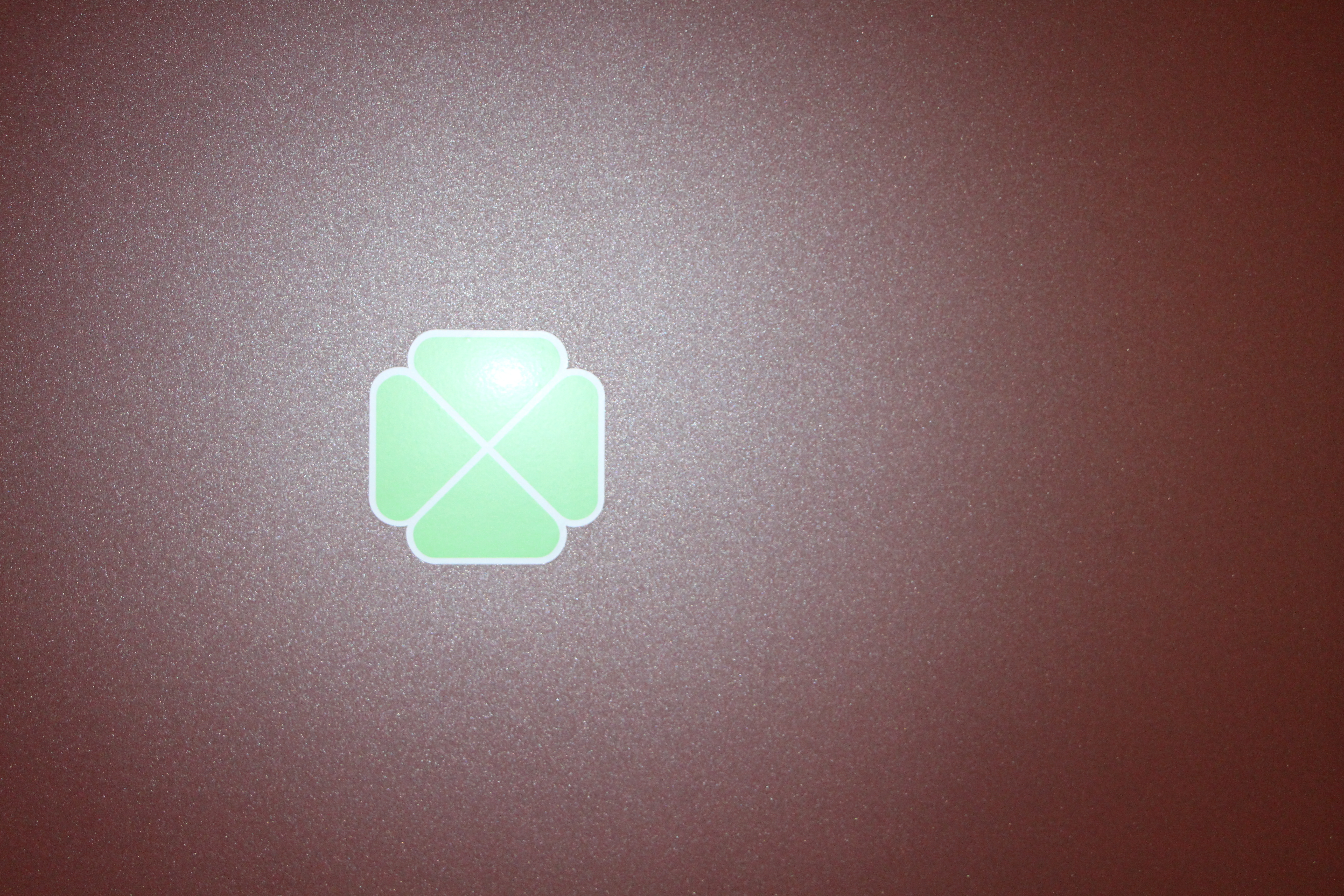 長野新幹線E7系グリーンクラス